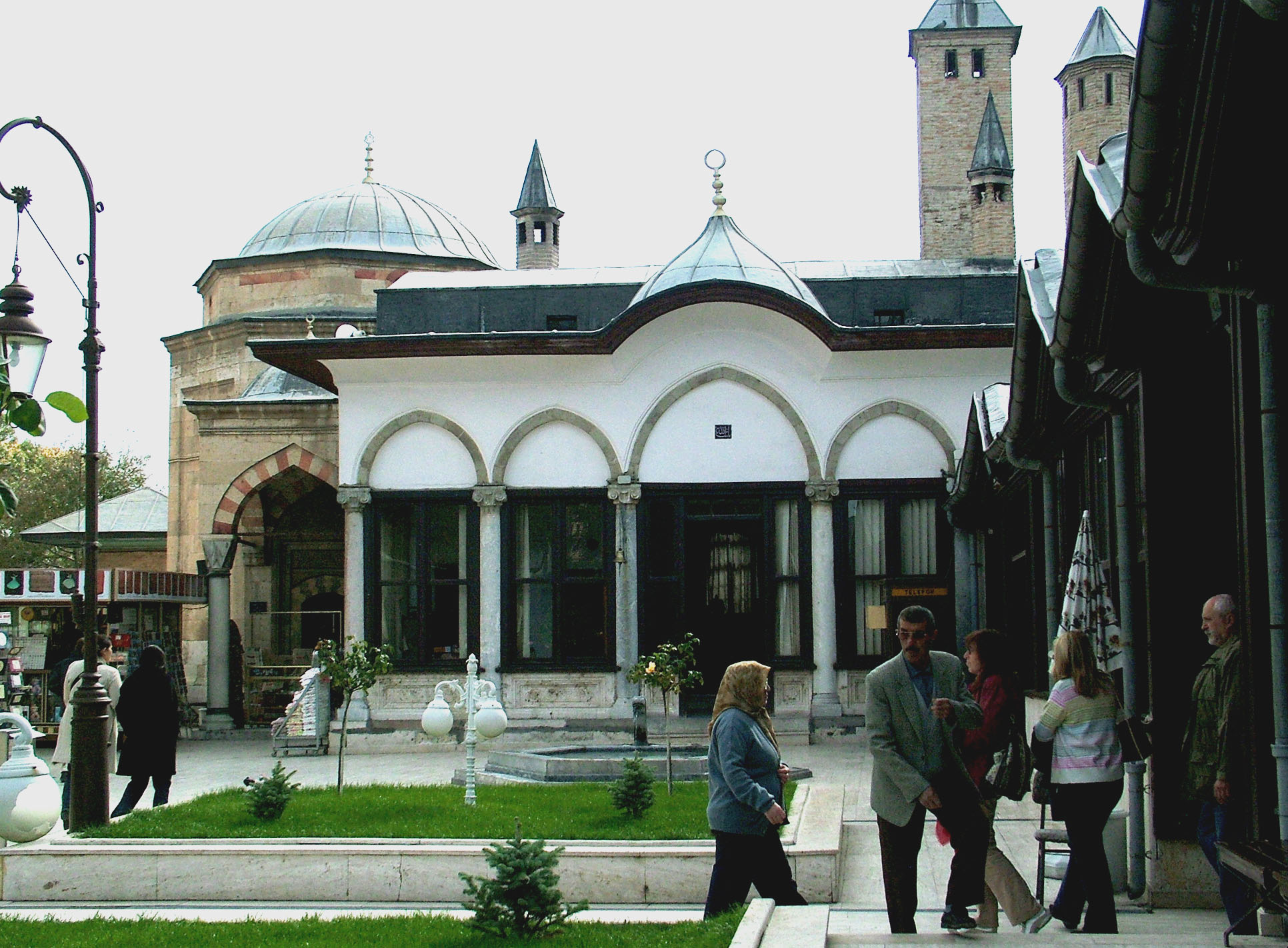 A Mevlana Múzeum belső udvara (Konya, Törökország)